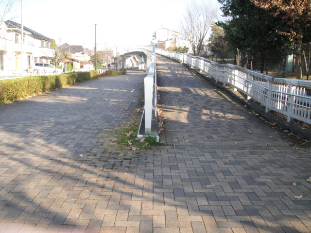 犬吠池歩道橋（八王子市）